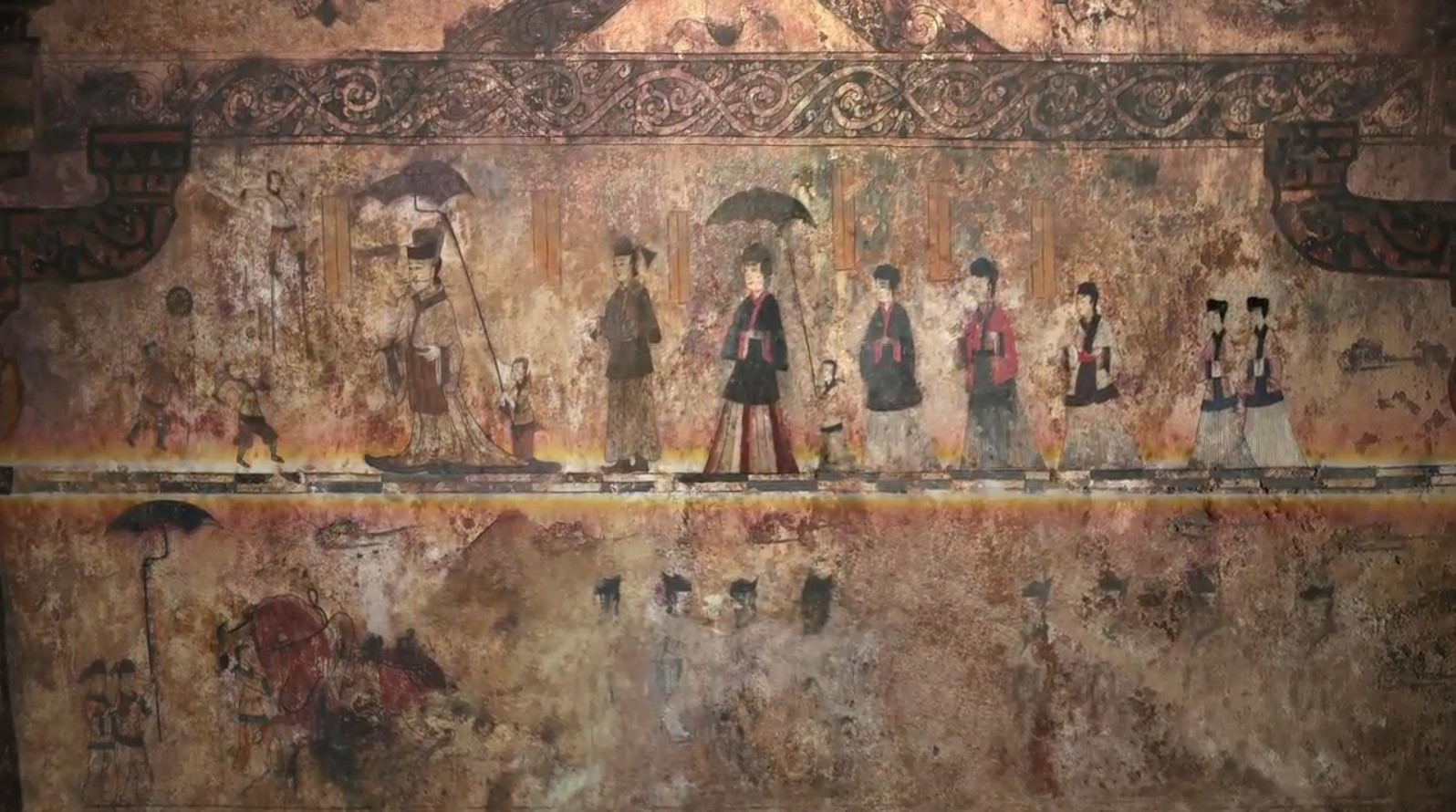 Susan-ri Tomb of Koguryo